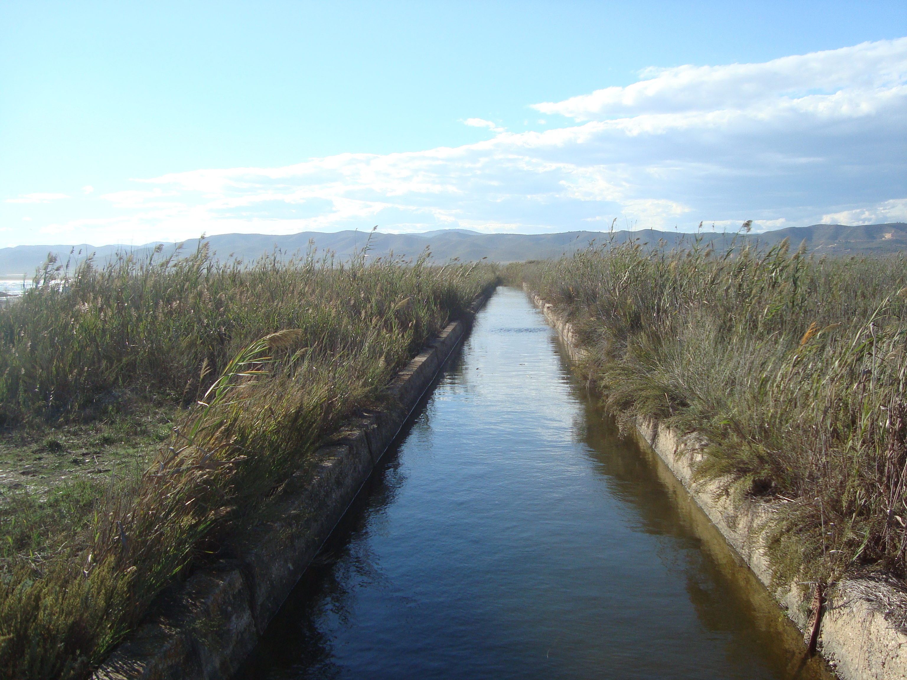 Prat de Cabanes i Torreblanca . La Séquia d'en Polo This is a photography of a Special Area of Conservation in Spain with the ID: ES0000060. Natura2000 entry, EEA entry